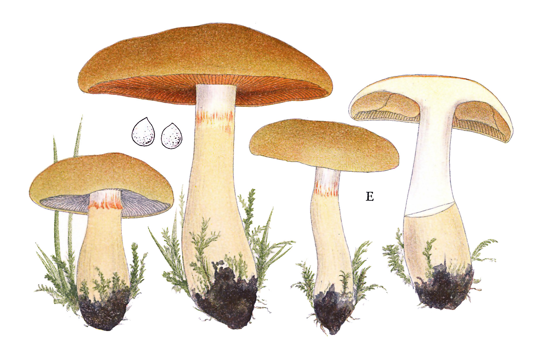 Jakob E. Lange: Flora agaricina Danica. Vol. 3; TAB. 90 E E. Cortinarius delibutus Description of Cortinarius collinitus by Lange.